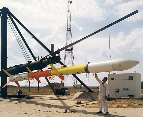 Javelin (Argo-D4) sounding rocket